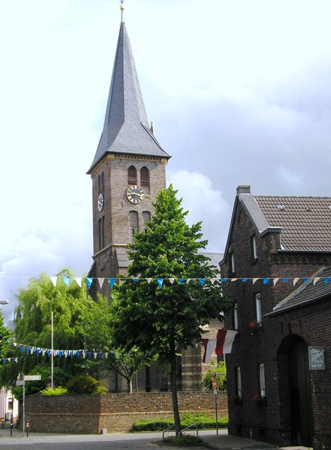 Alte Landstraße Niederaußem, mit Blick auf die Kirche St. Johann Baptist, während des Schützenfest.